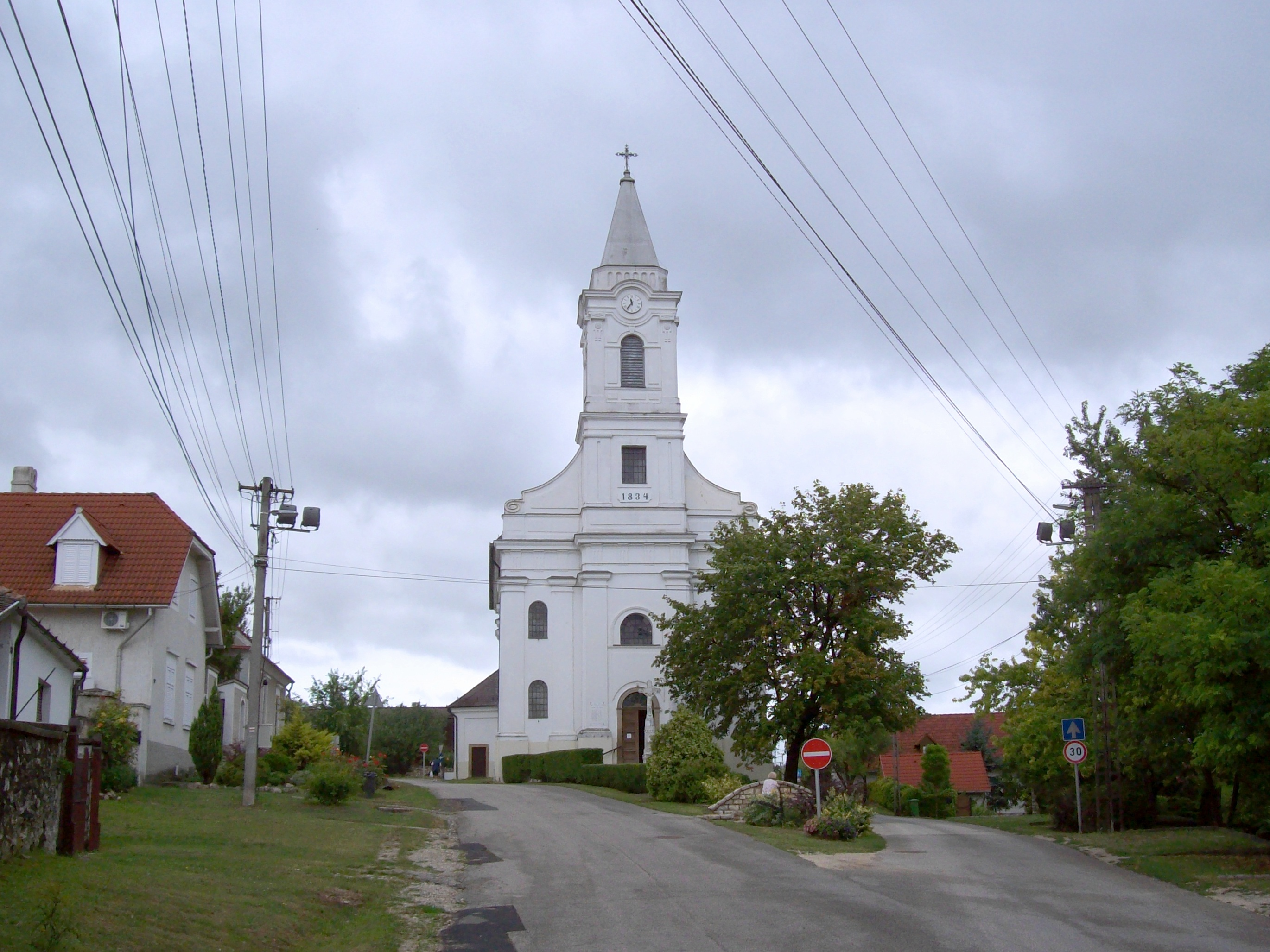 Aszófő - Szent László római katolikus templom